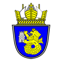 Герб Бургасской области